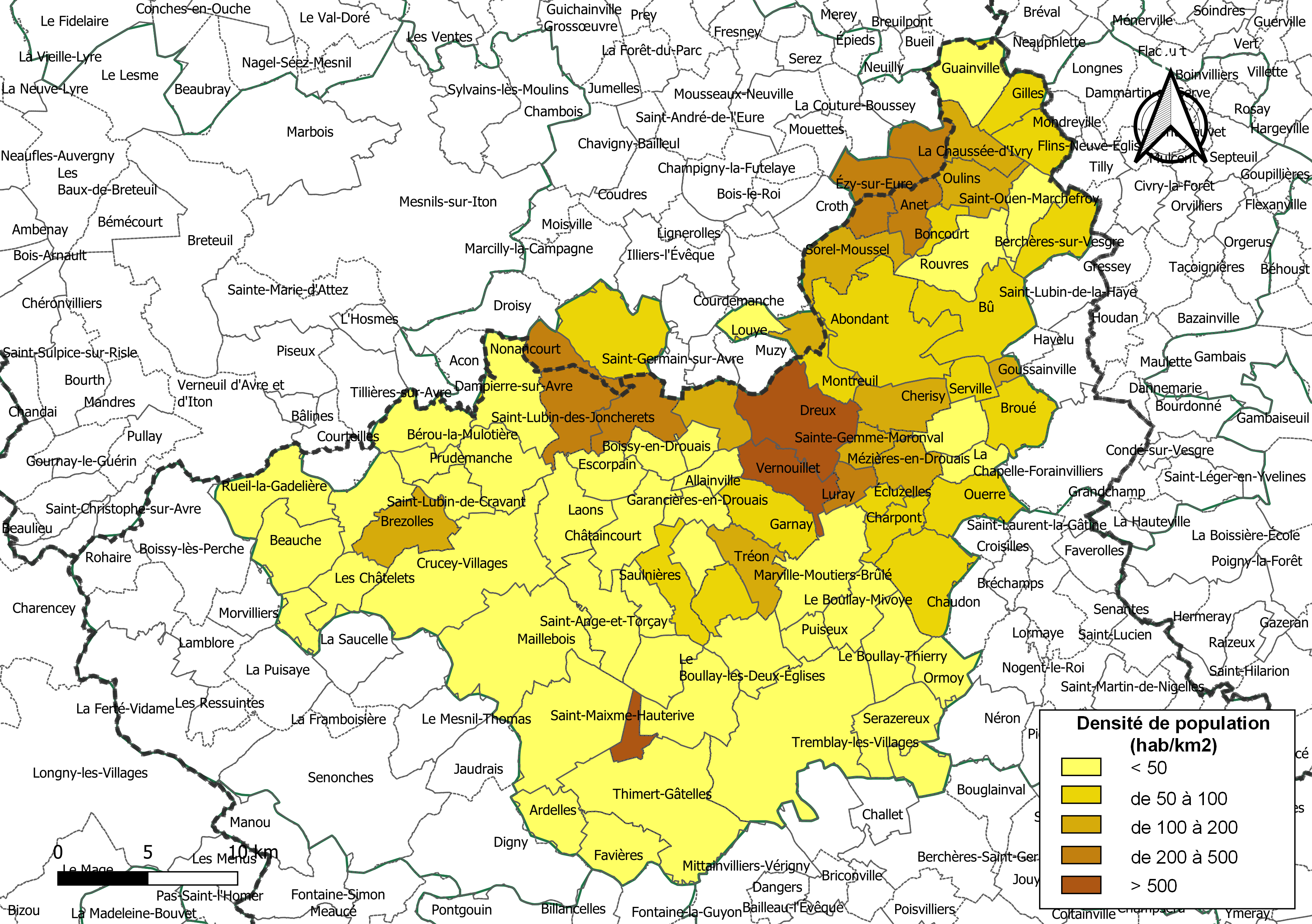 Carte des densités de population (millésimée 2016) des communes de la communauté de communes la Communauté d'agglomération du Pays de Dreux, département d'Eure-et-Loir, France. Composition au 1er janvier 2019.